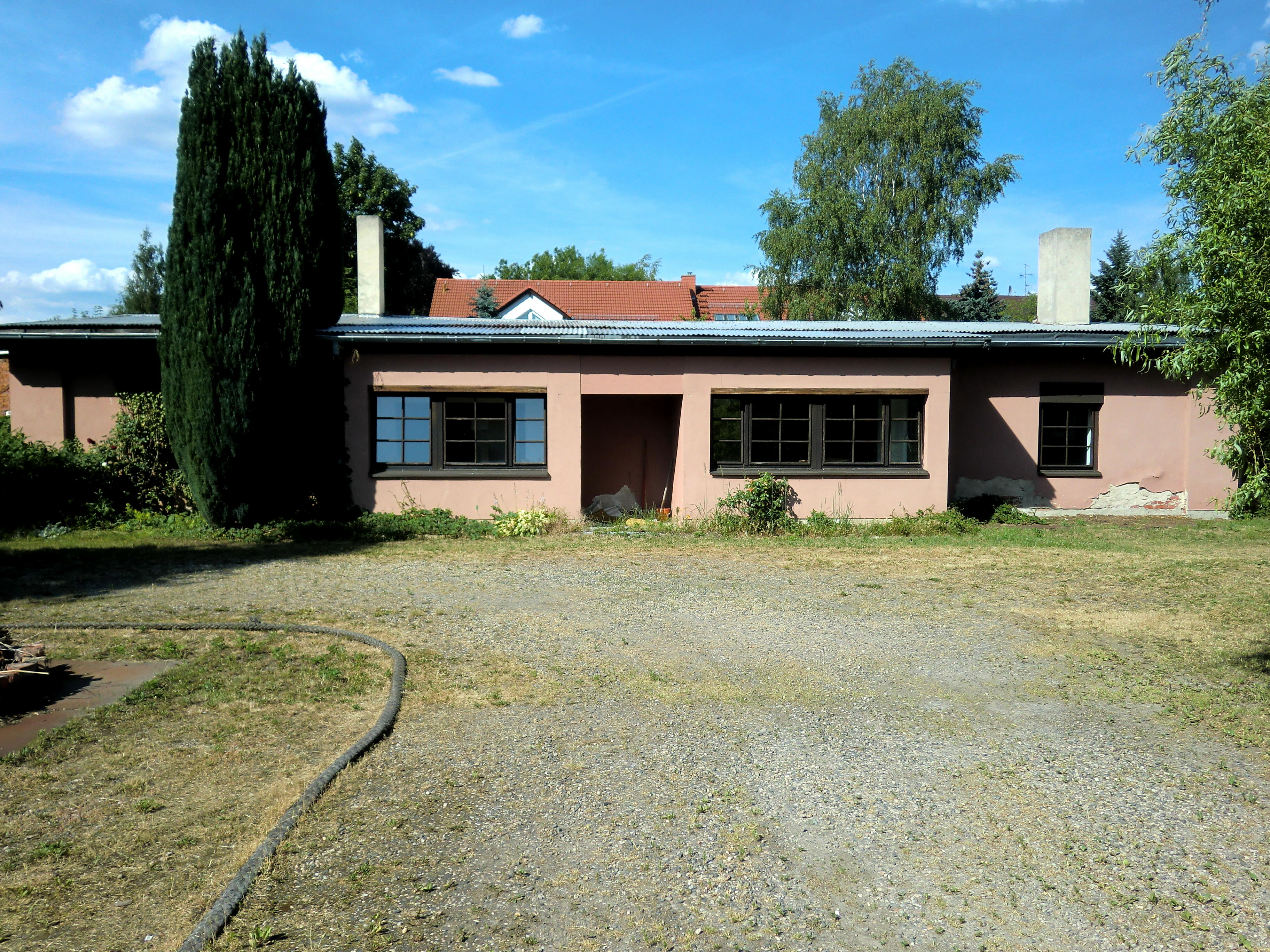 Dresden, Würzburger Str. Baracke Zustand 2014